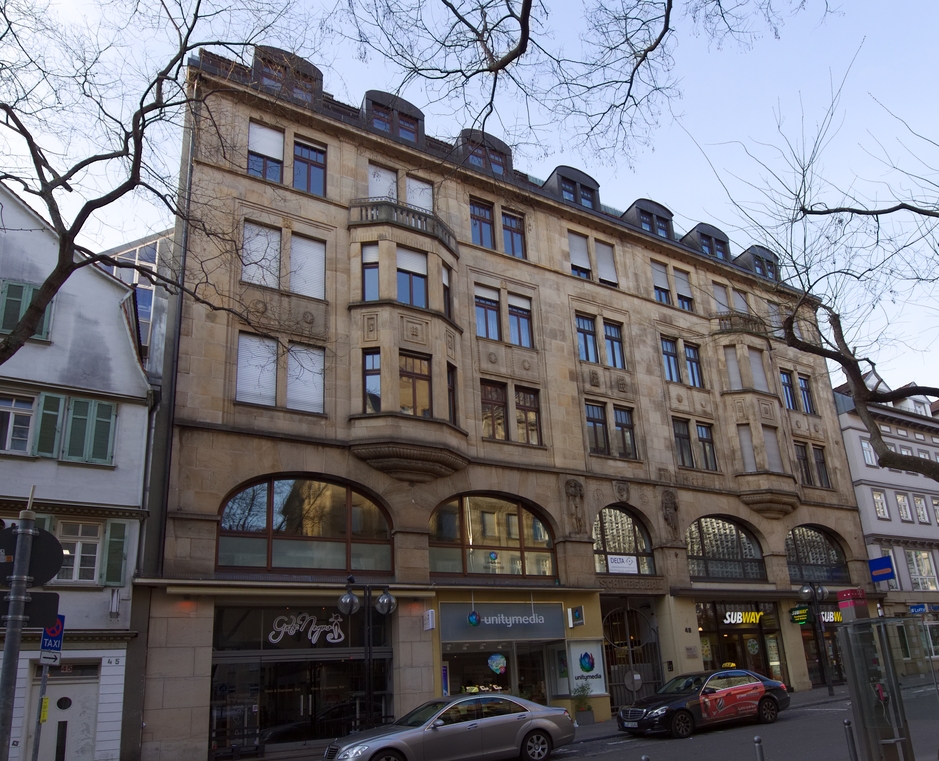 Geschäftshaus Schillerbau nebst Miets- und Geschäftshaus (Sachgesamtheit) Eberhardstr. 47, 49, Stuttgart. Erbaut 1910-1913 von Carl Heim und Jakob Früh im Stil des Neoklassizismus. Geschützt nach § 2 DSchG.